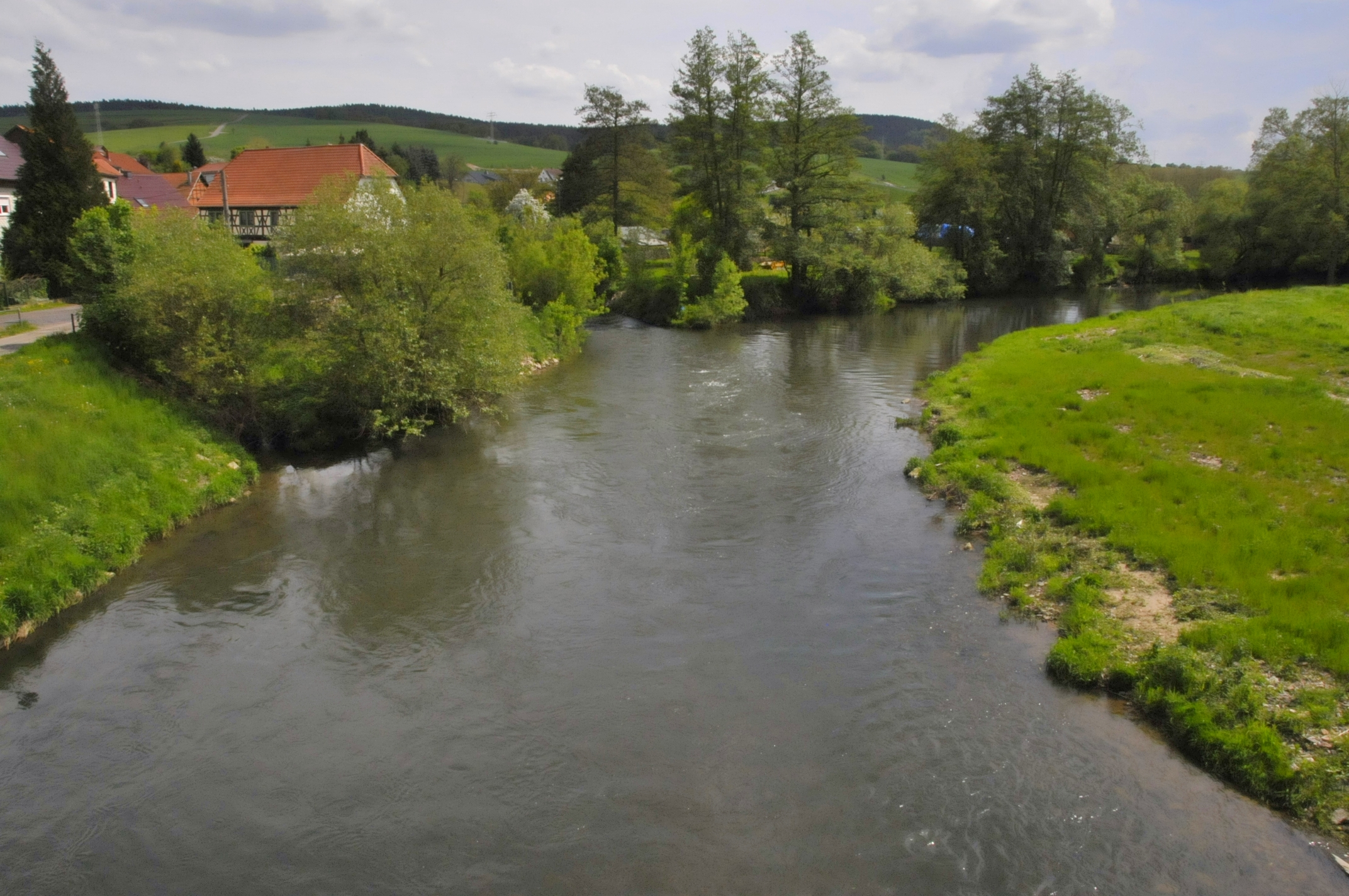 Schwallungen, Werra mit Mühlbachmündung